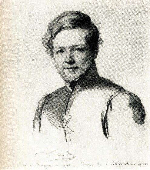 Porträt von David D'Angers